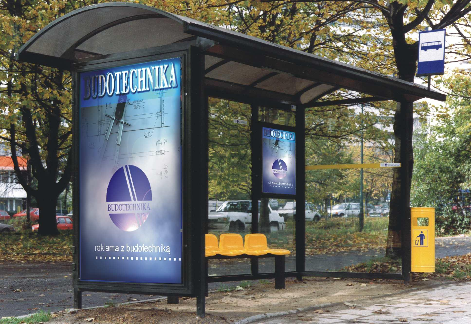 Merkury z Gablotą Reklamową Gablotką Info Fotelikami z Laminatu Koszem na Śmieci Znakiem Przystanku na Wysięgniku pic2